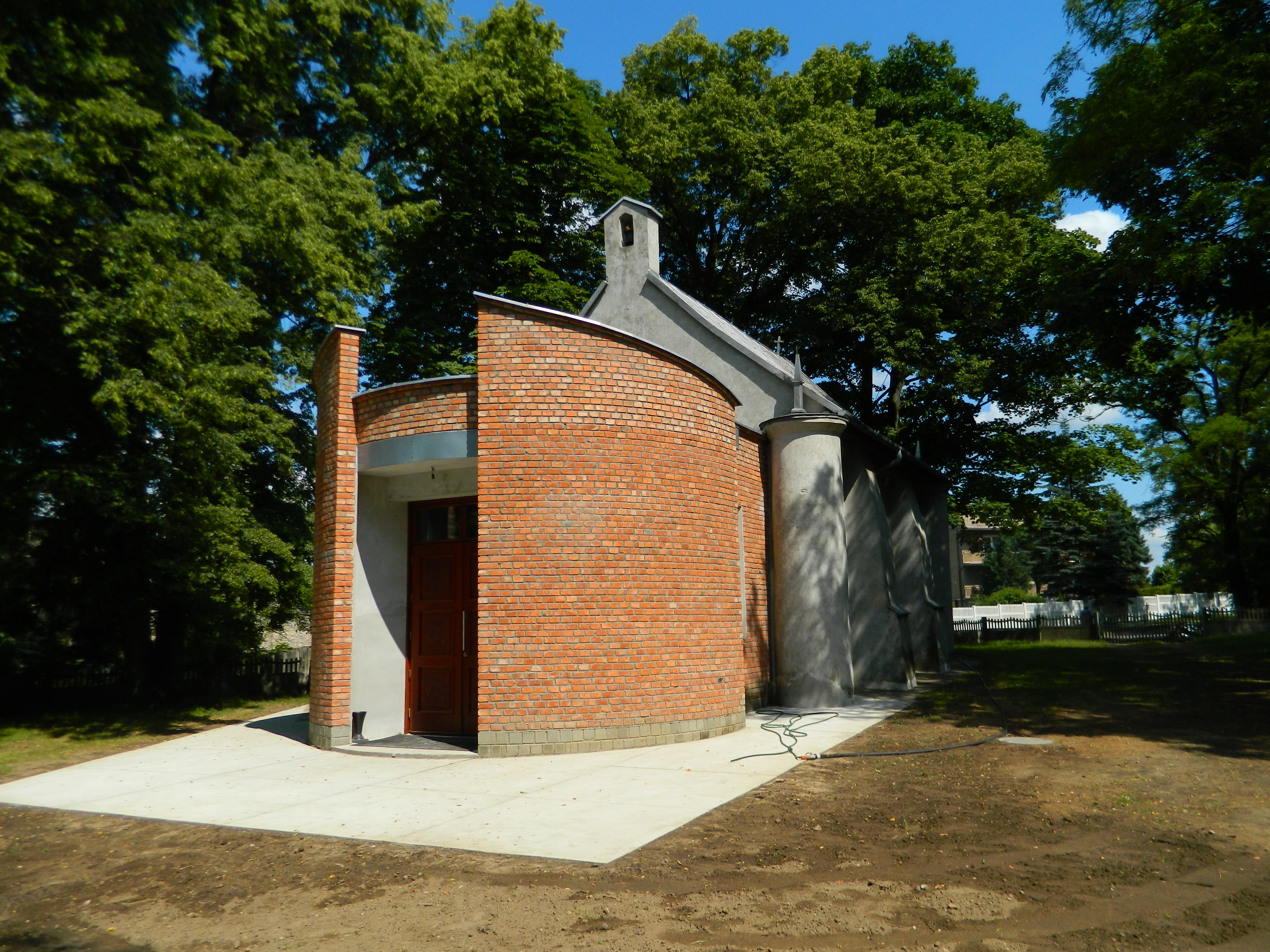 Kościół filialny św. Marii Magdaleny w Częstochowie, dzielnica Grabówka, osiedle Żabiniec, ul. Ikara.